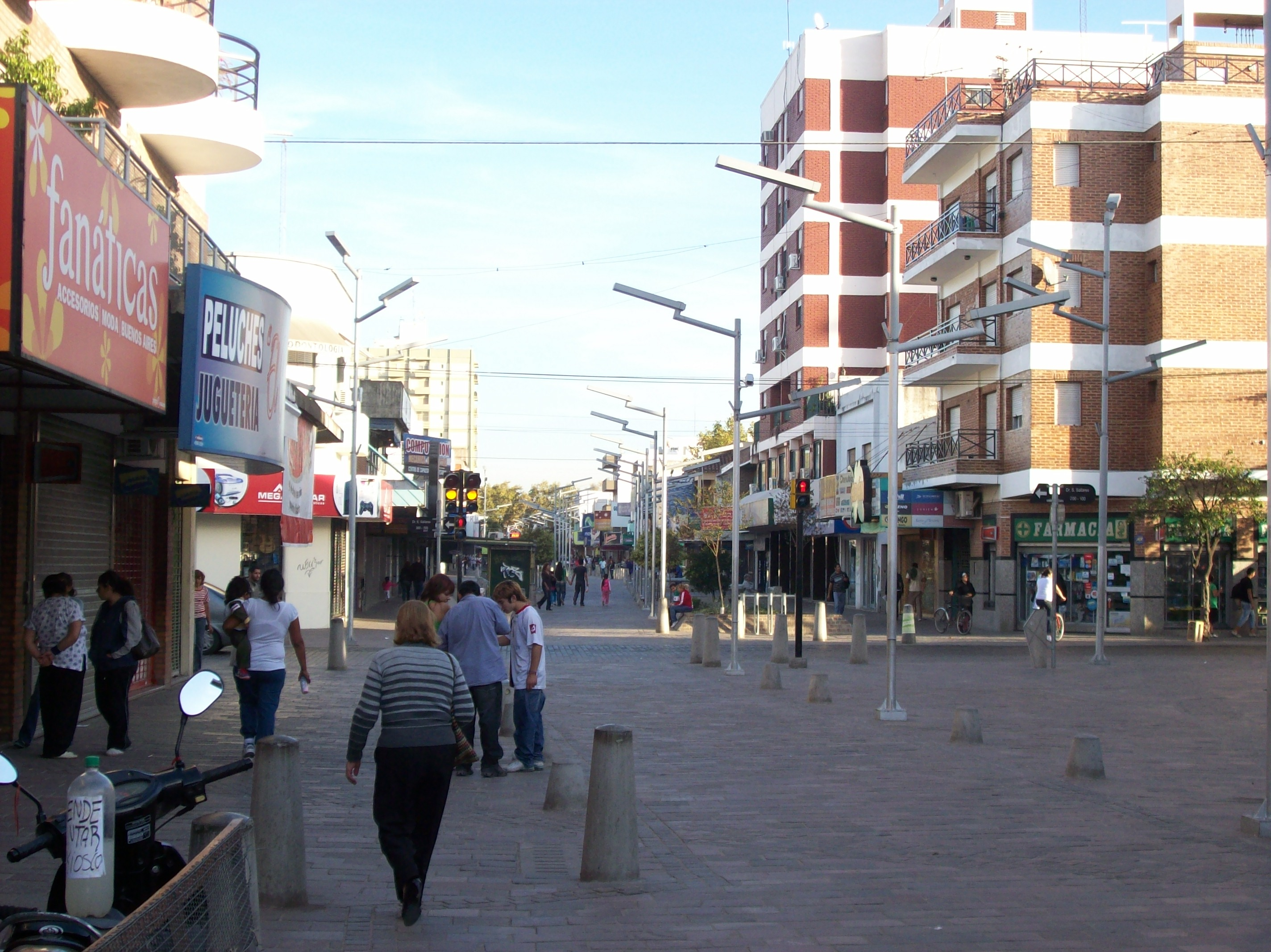 Calle peatonal Bernardo de Monteagudo en Florencio Varela.